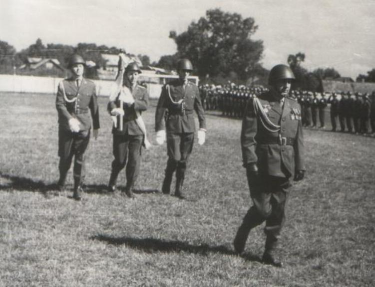 Garnizon Przasnysz. Uroczystość nadania sztandaru ufundowanego przez społeczeństwo Przasnysza dla 2 Ośrodka Radioelektronicznego (JW 4420). Sztandar wręczył gen. bryg. Władysław Oliwa. Jednocześnie jednostka przyjęła imię kan. Michała Okurzałego. Na czele dowódca jednostki płk Zbigniew Mróz, za nim poczet sztandarowy w prezentacji sztandaru